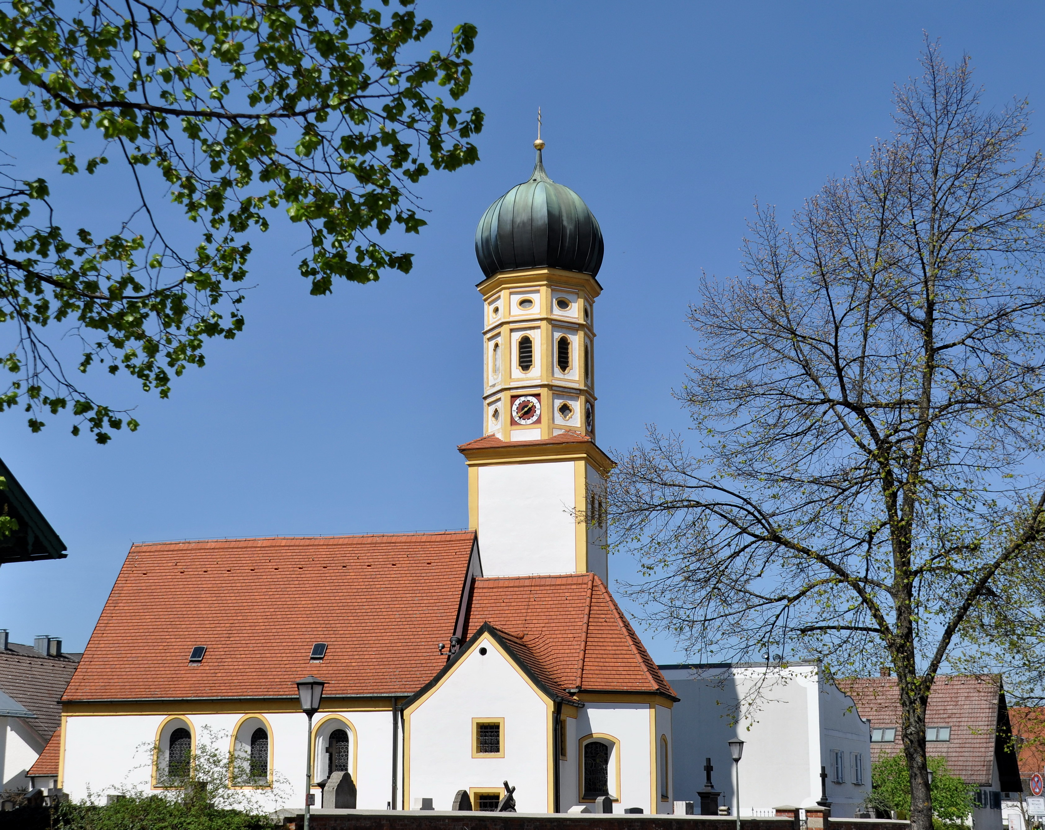 St.Peter in Grosshadern, Munich